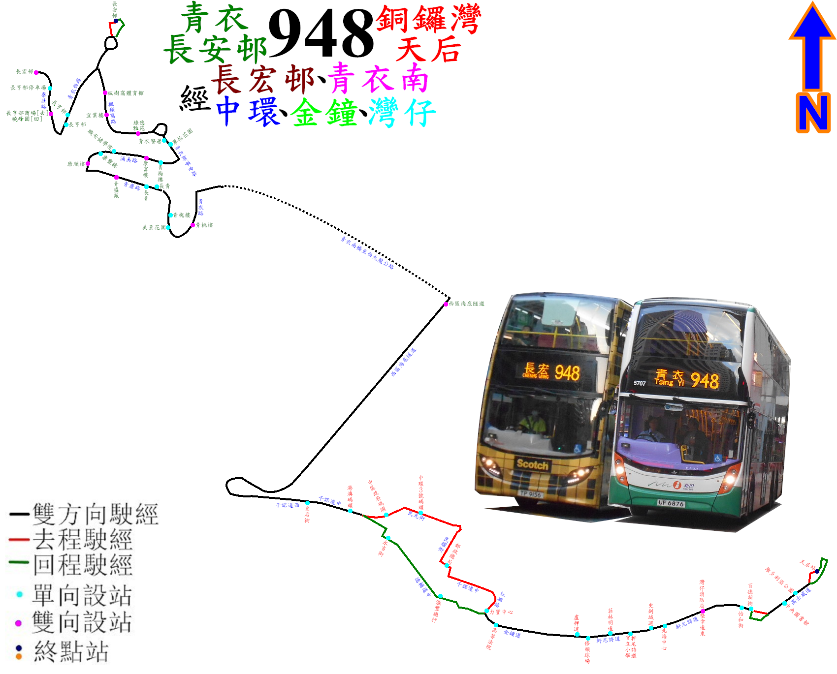 過海隧巴948線的走線圖